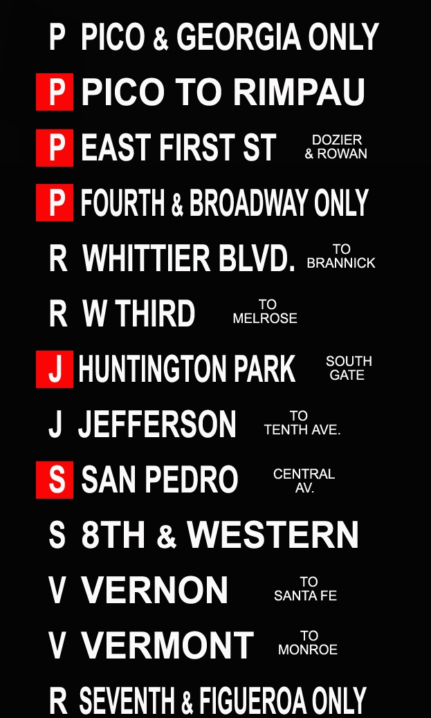 Zelfgemaakte media in Photoshop CS